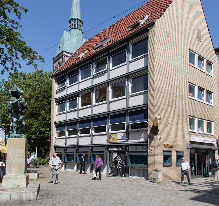 Geschäftshaus der Gold- und Silberschmiede Th. Blume am Hohen Weg vor dem Hildesheimer Huckup. Im Hintergrund die St. Andreaskirche.